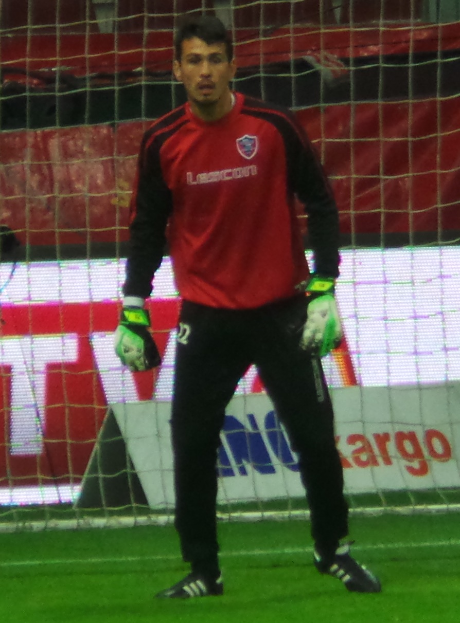 Bora Körk